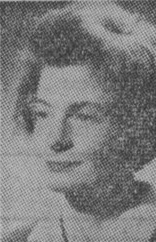 Ebba-Stina Schalin-Hult